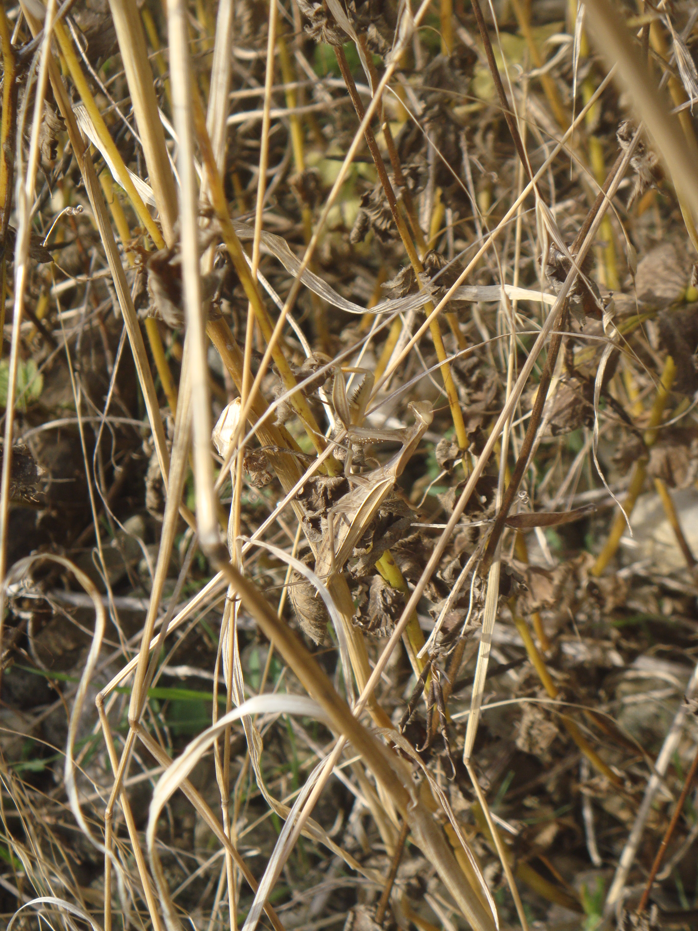 Une mante religieuse de couleur beige. Ain, France.